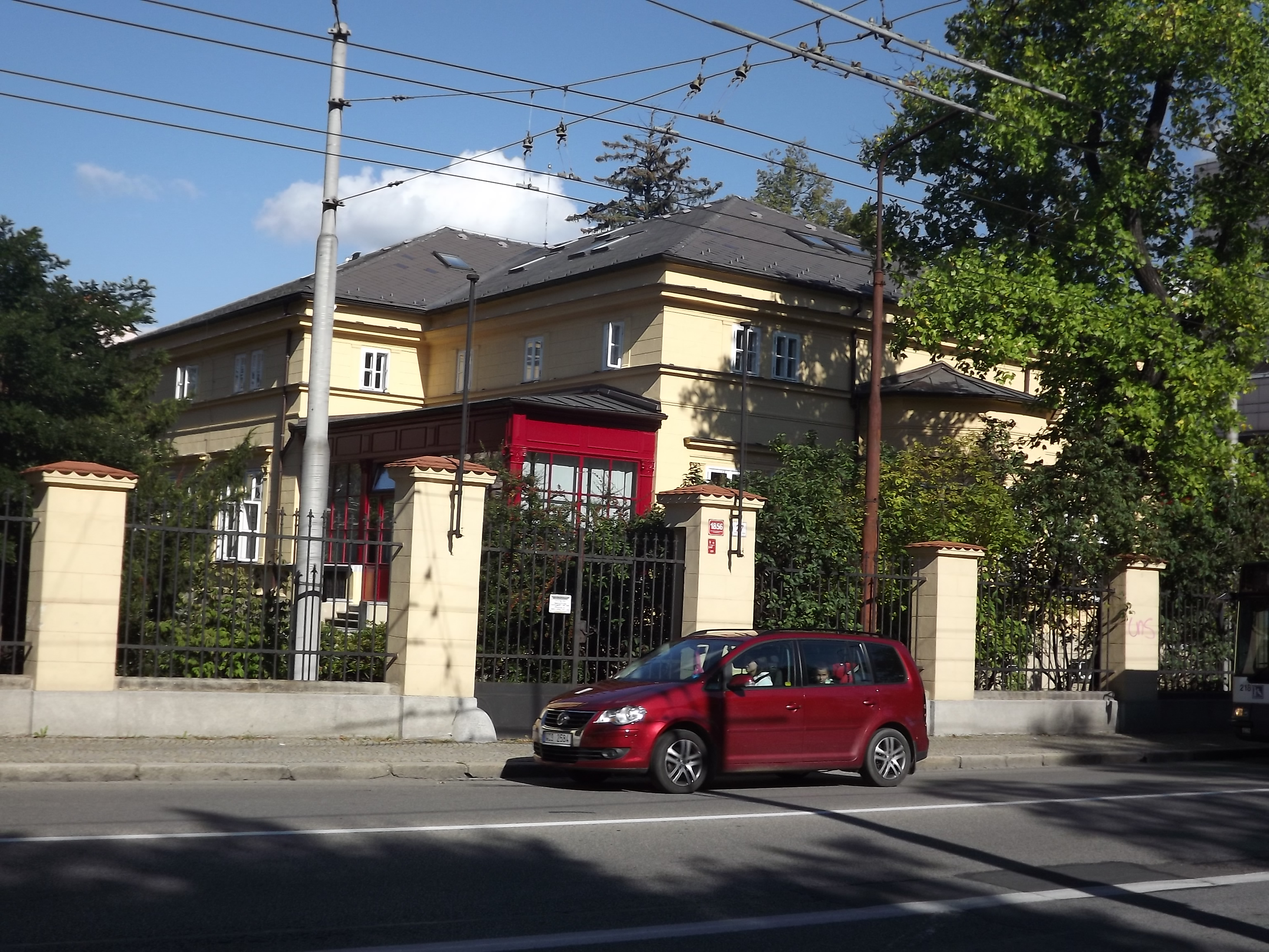 Vila Eggertova, Na sadech 1856, České Budějovice